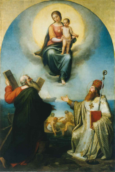 “Madonna col Bambino e Santi Andrea e Nicola di Bari”, olio su tela, cm 330 × 220, datato e firmato, Chiesa d S. Maria del Ponte al Porto, Senigallia